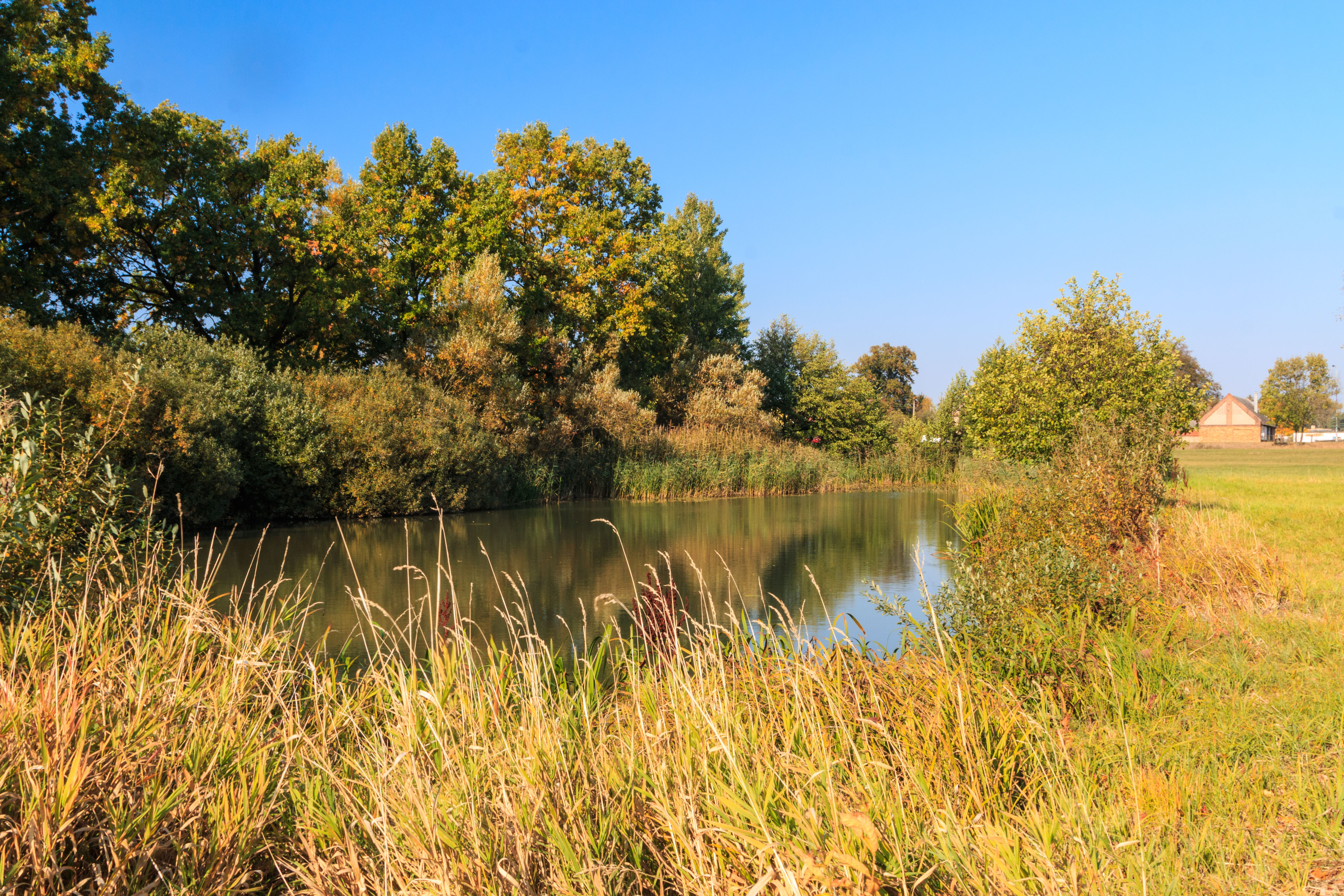 V Lukách - mrtvé rameno Orlice u Slezského předměstí b Hradci Králové Project: Vodstvo.